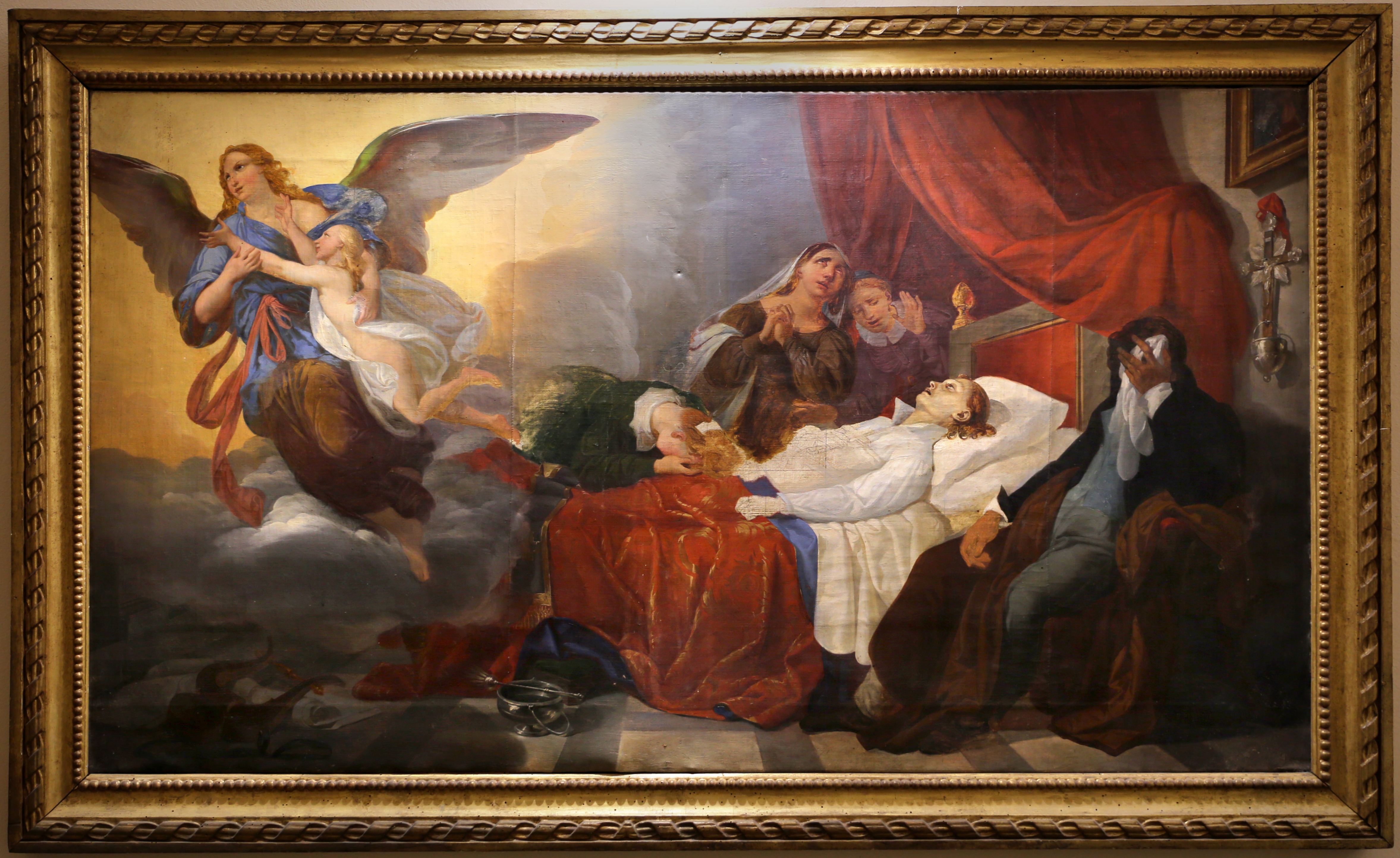 Museo civico di Montepulciano This is a photo of a monument which is part of cultural heritage of Italy.